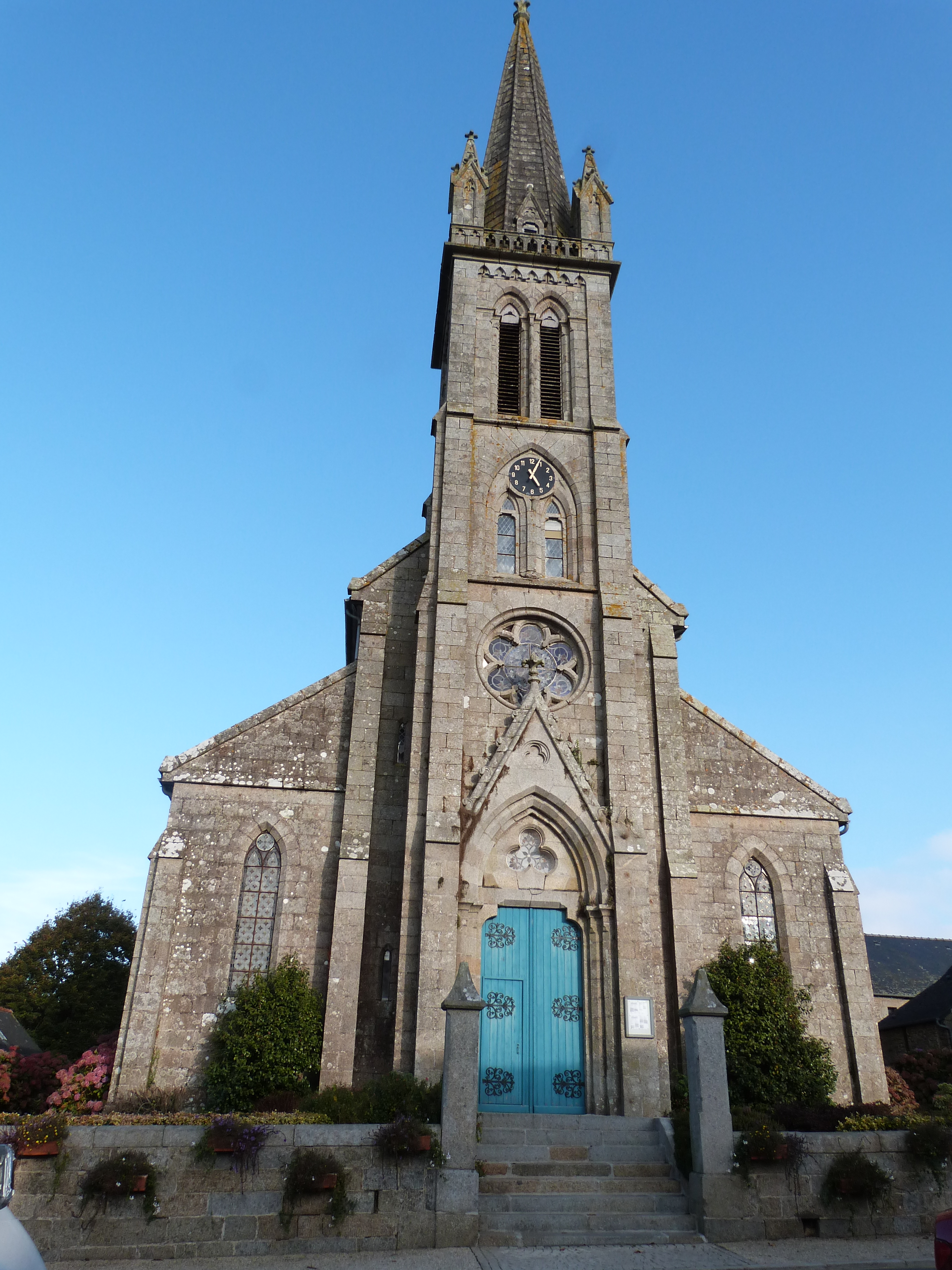 Eglise Notre-Dame de Gomené